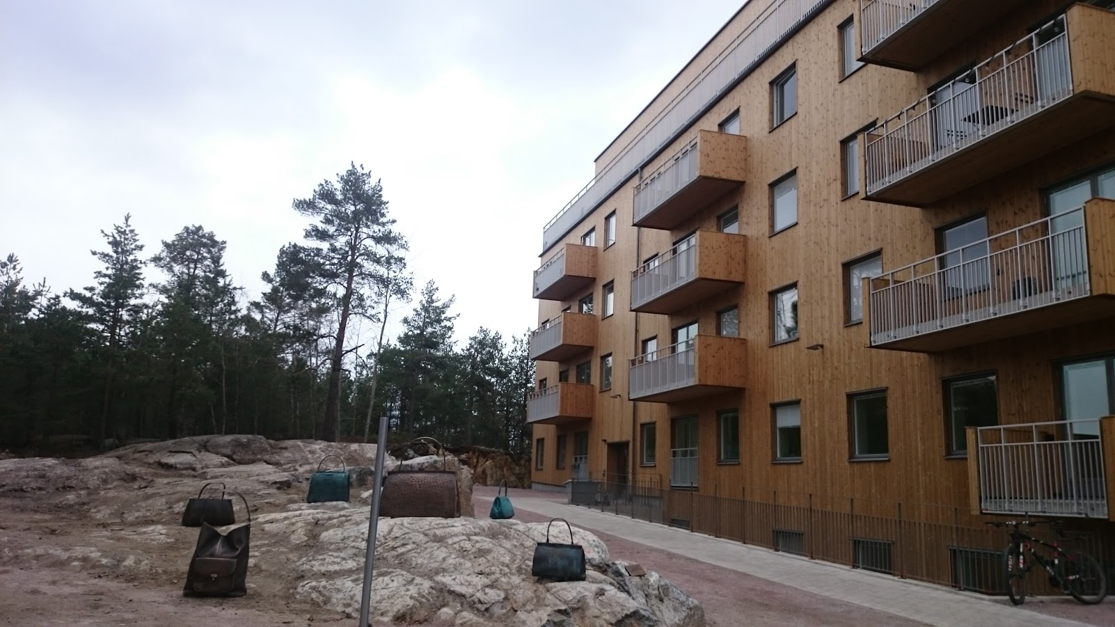 Kvarteret Taklampan med adress Finn Malmgrens väg 87 belägen alldeles intill Hammarbybacken